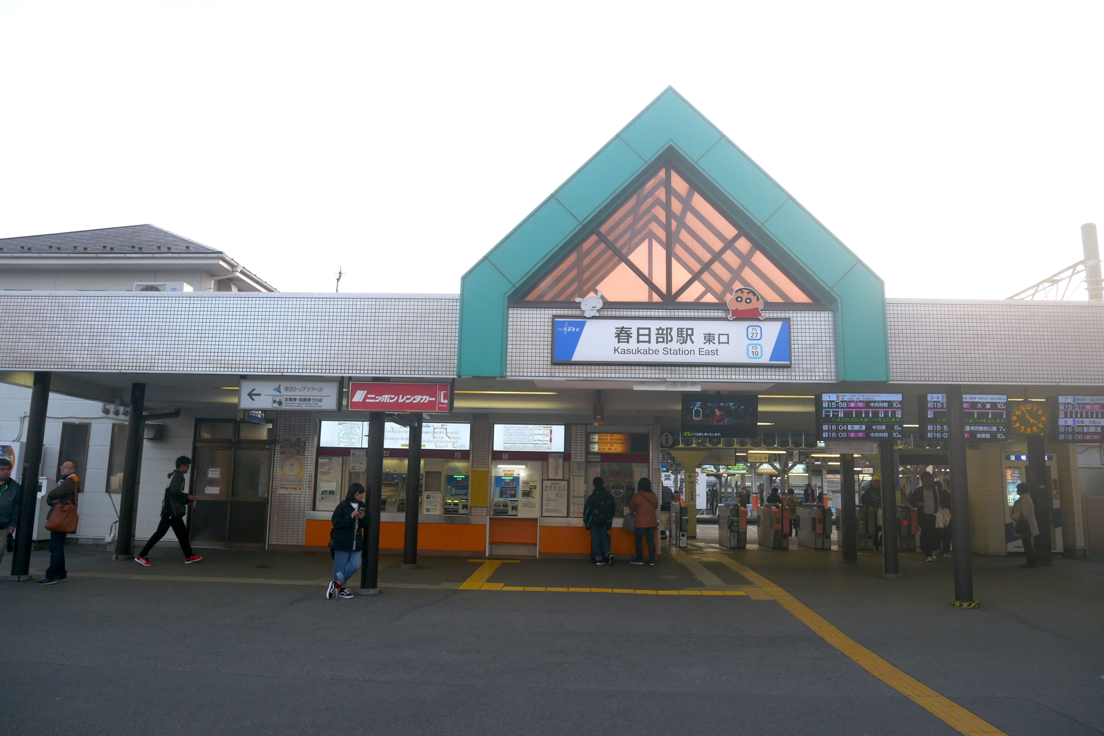 Kasukabe Station east exit (春日部駅の東口)